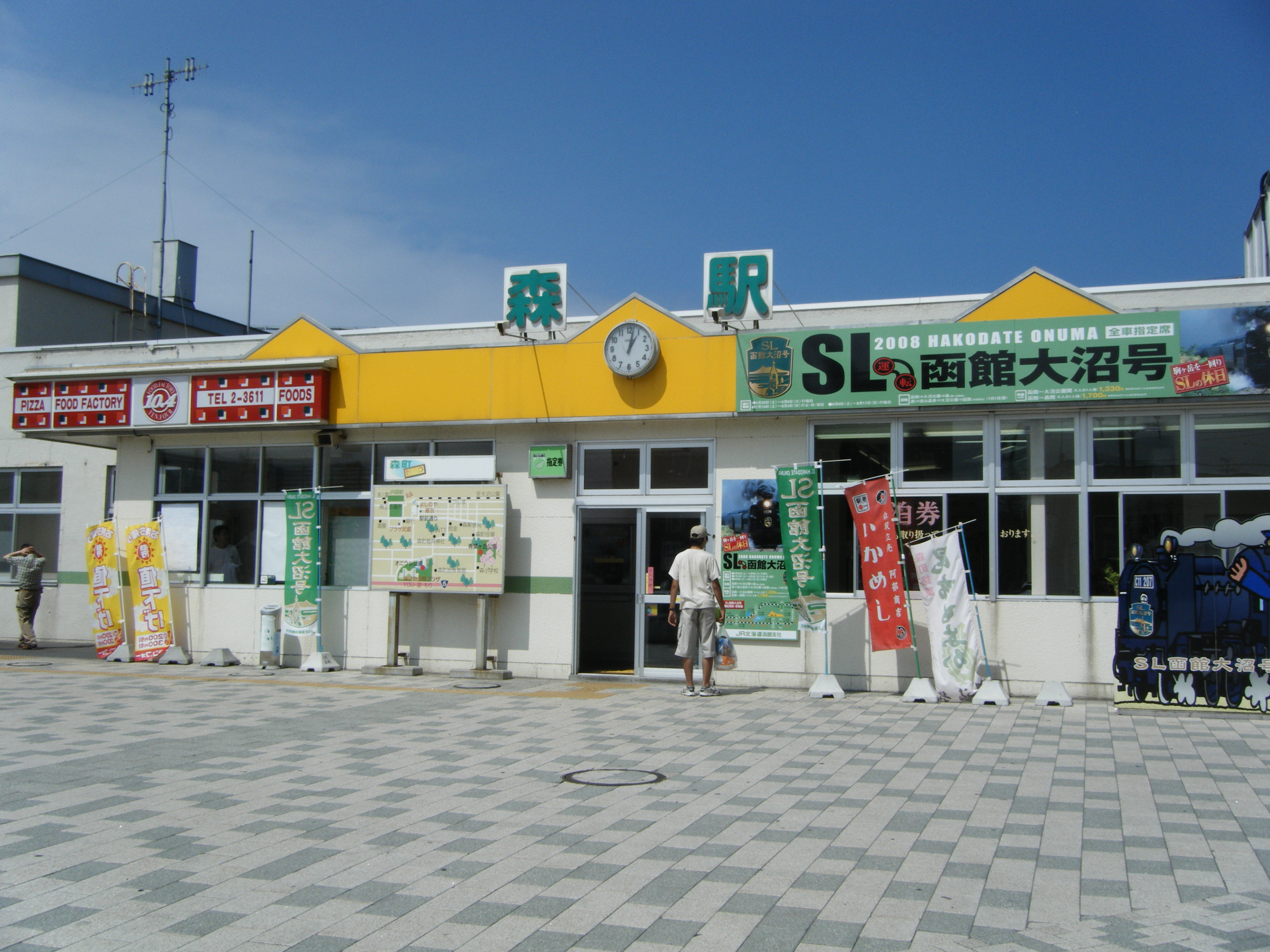 森駅駅舎